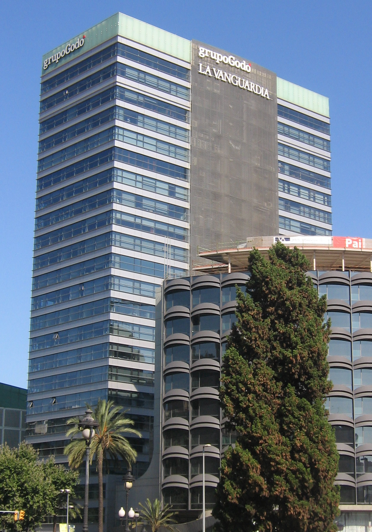 Sede del Grupo Godó. Avenida Diagonal. Foto tomada desde la Plaza Francesc Macià de Barcelona (España).